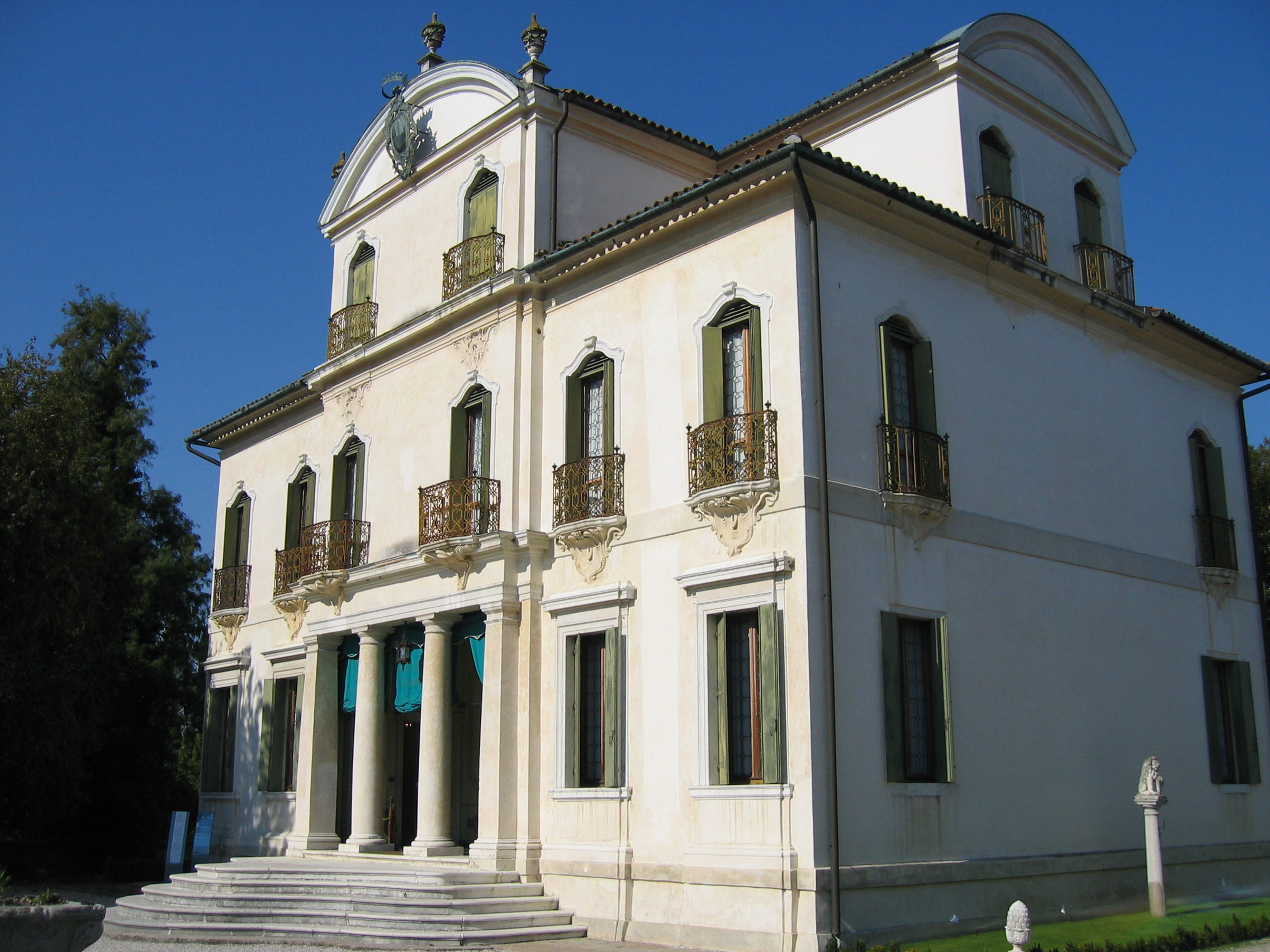 Villa Widmann Rezzonico Foscari a Mira (Province of Venice, Italy)